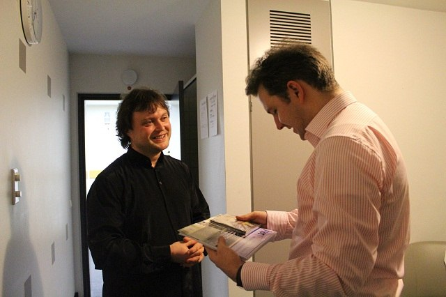 Вадим Пчёлкин и Йоганес Клюмп после концерта Хора мальчиков с Нюрнбергский оркестром